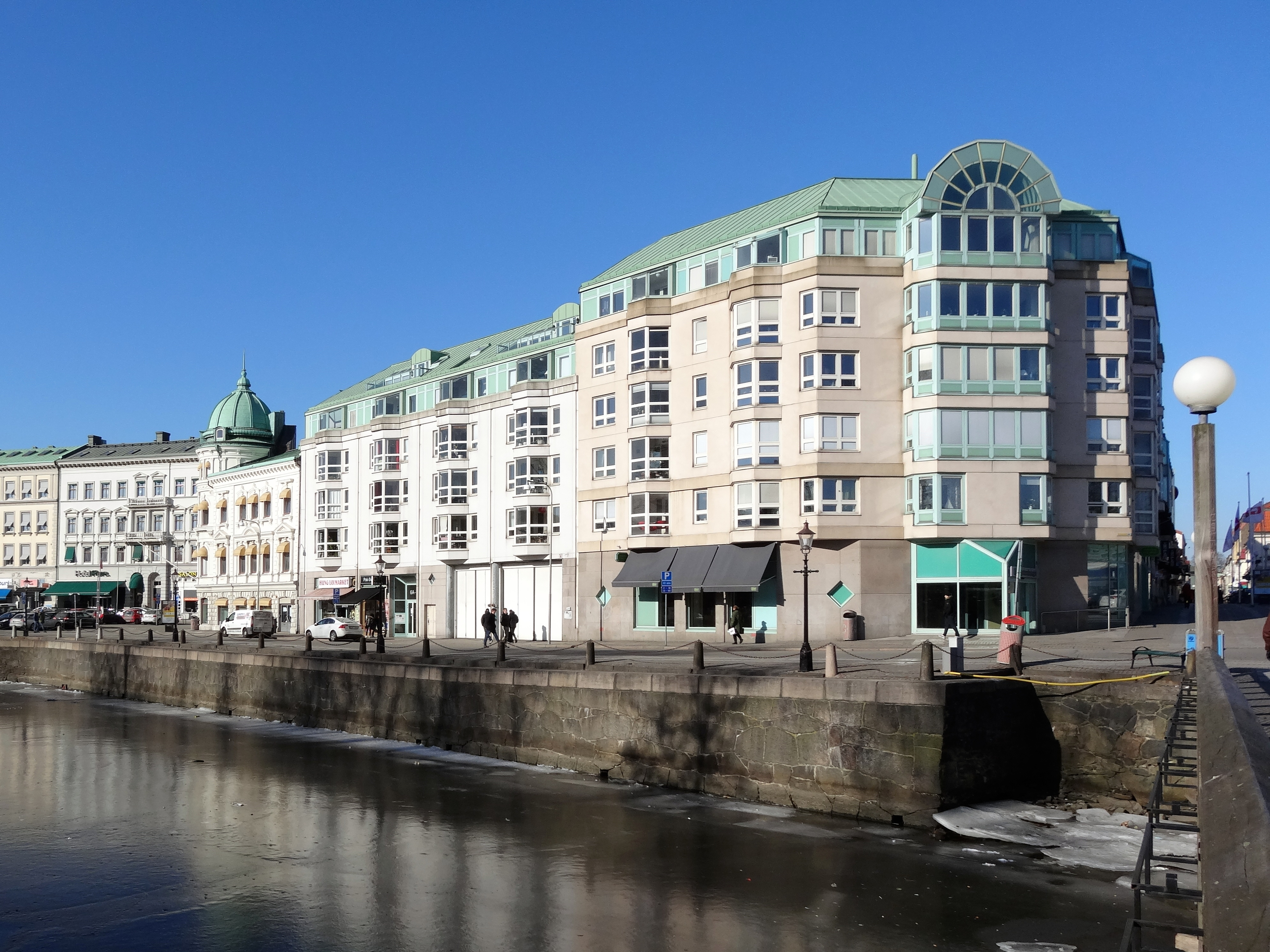 Basargatan i stadsdelen Inom Vallgraven i Göteborg. Vy mot den västliga delen av gatan från Basarbron.